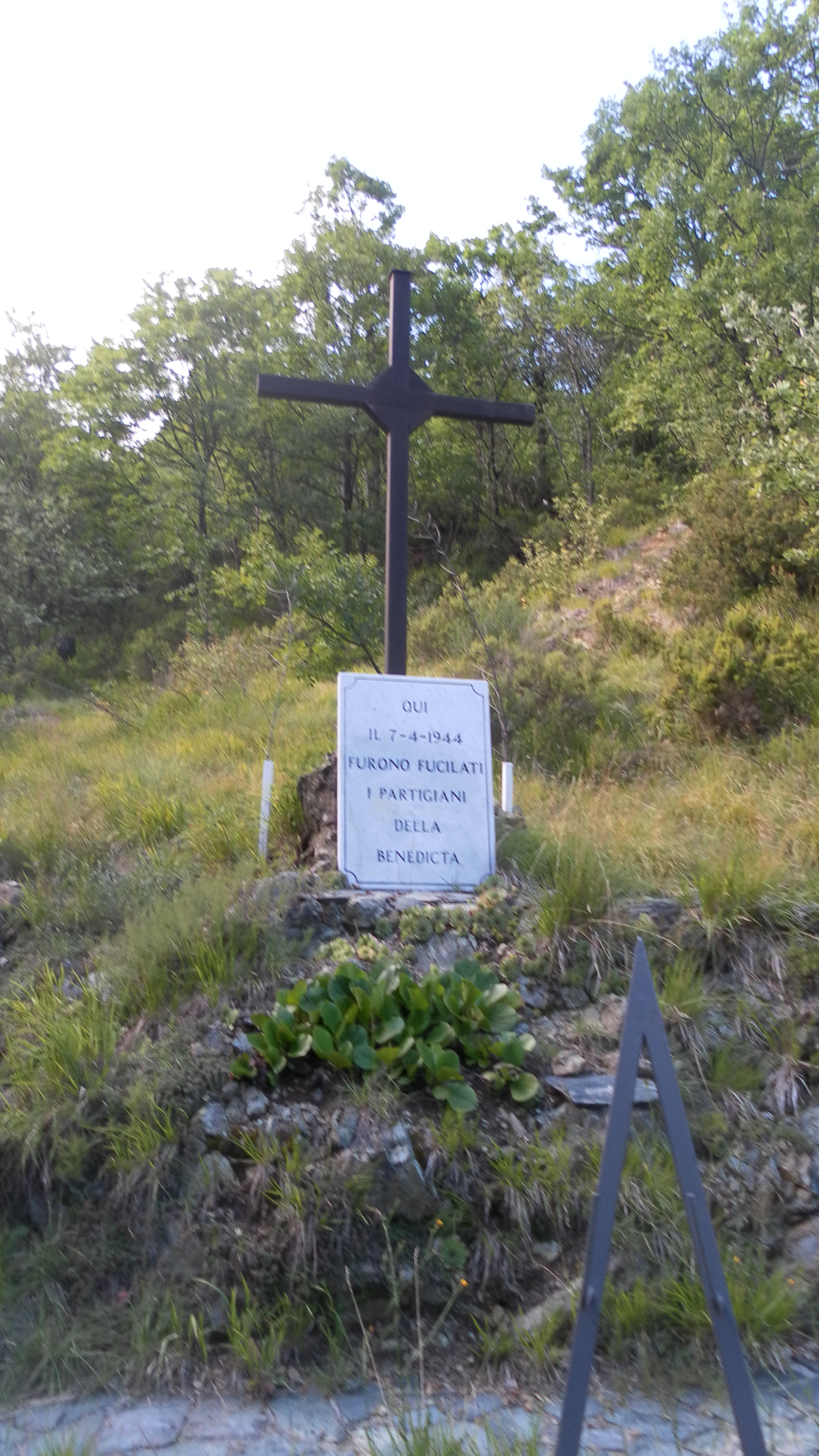 Luogo dell'eccidio della benedicta presso l'Abbazia della Benedicta, Bosio (AL)